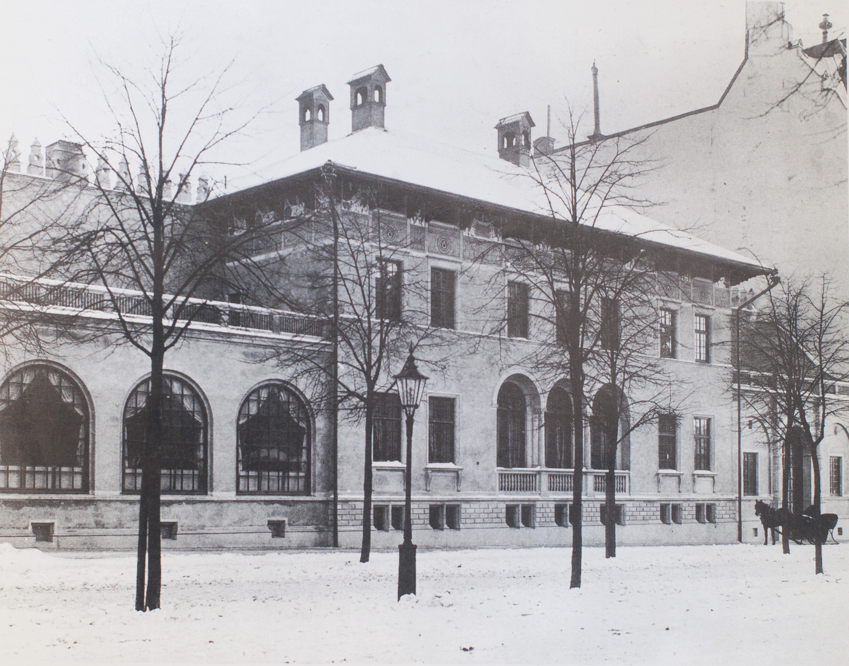 Bromska palatset omkring 1900